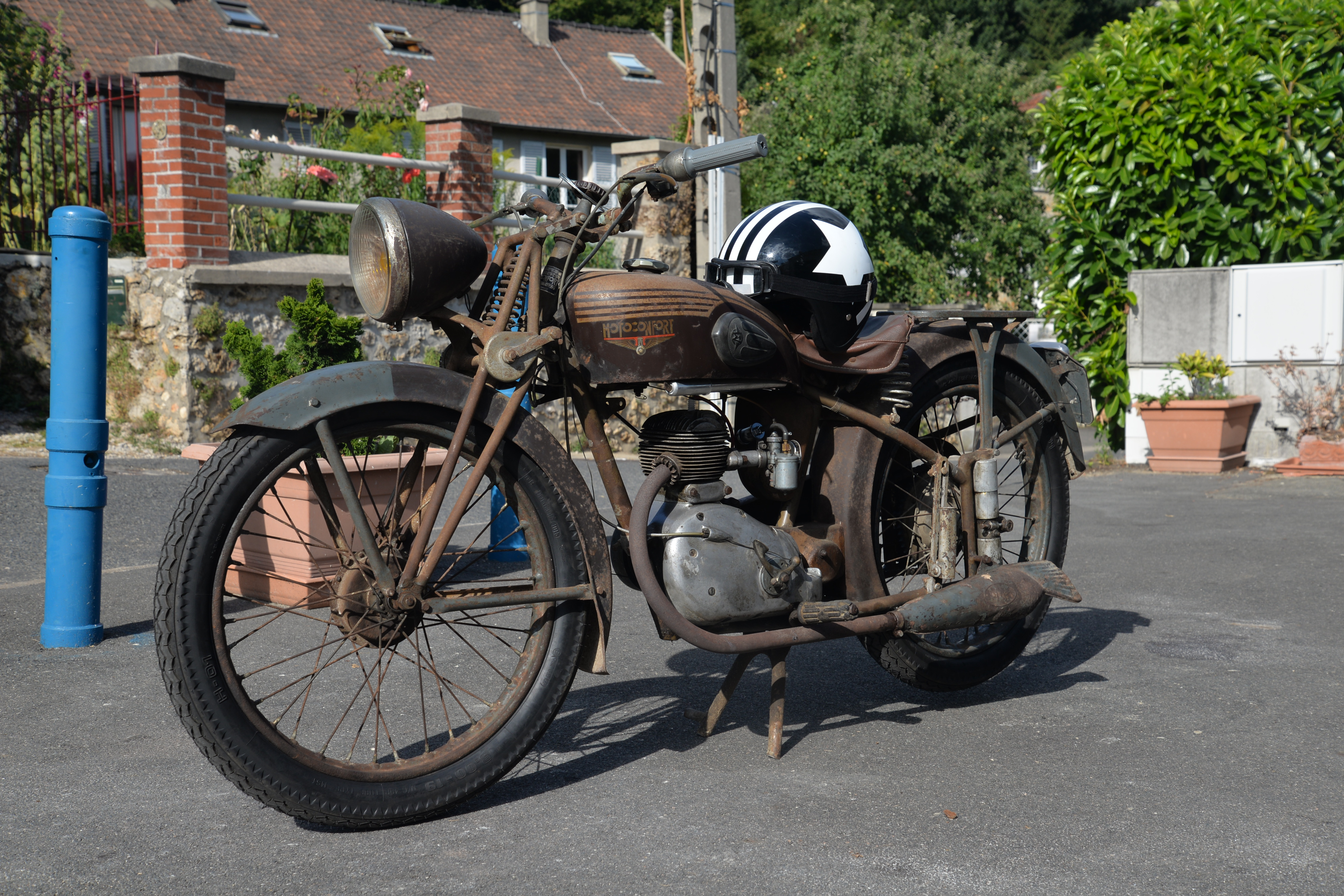 Motoconfort type C45S de 1951 , dernière année avec la fourche à parallélogramme.